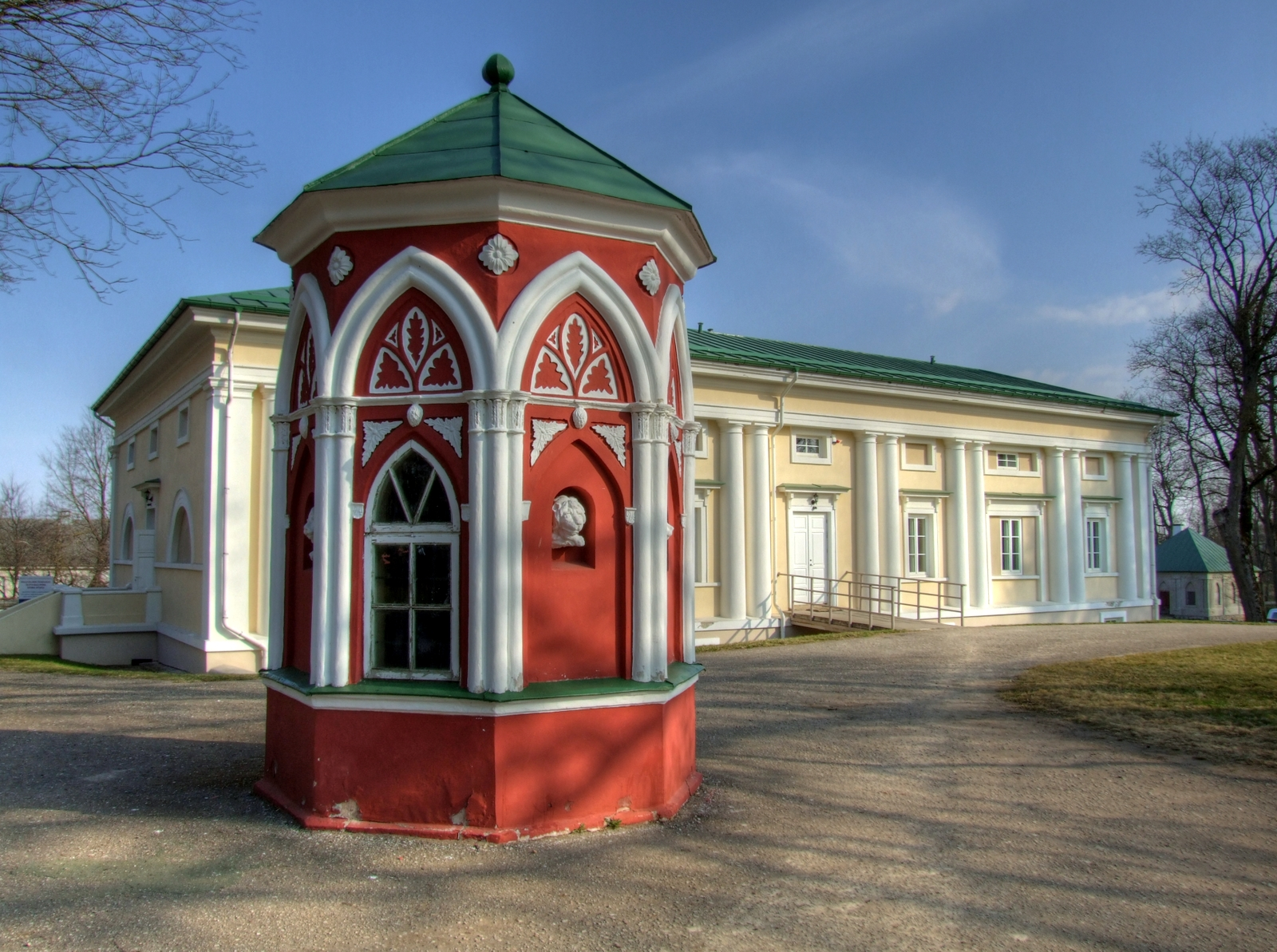 Baisogala manor